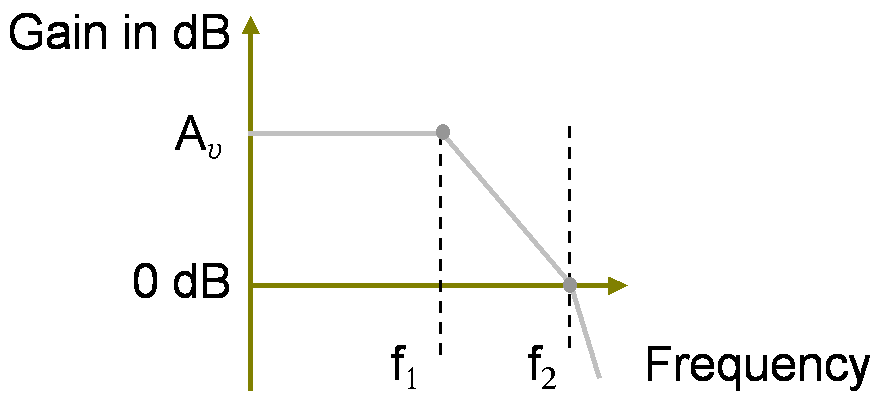 Two-pole BOde magnitude plot